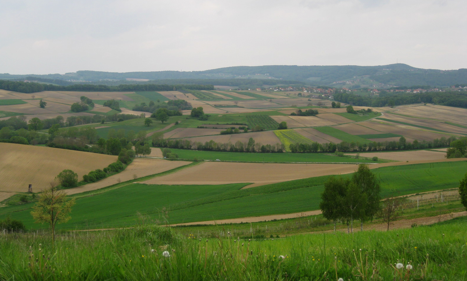 Goričko park